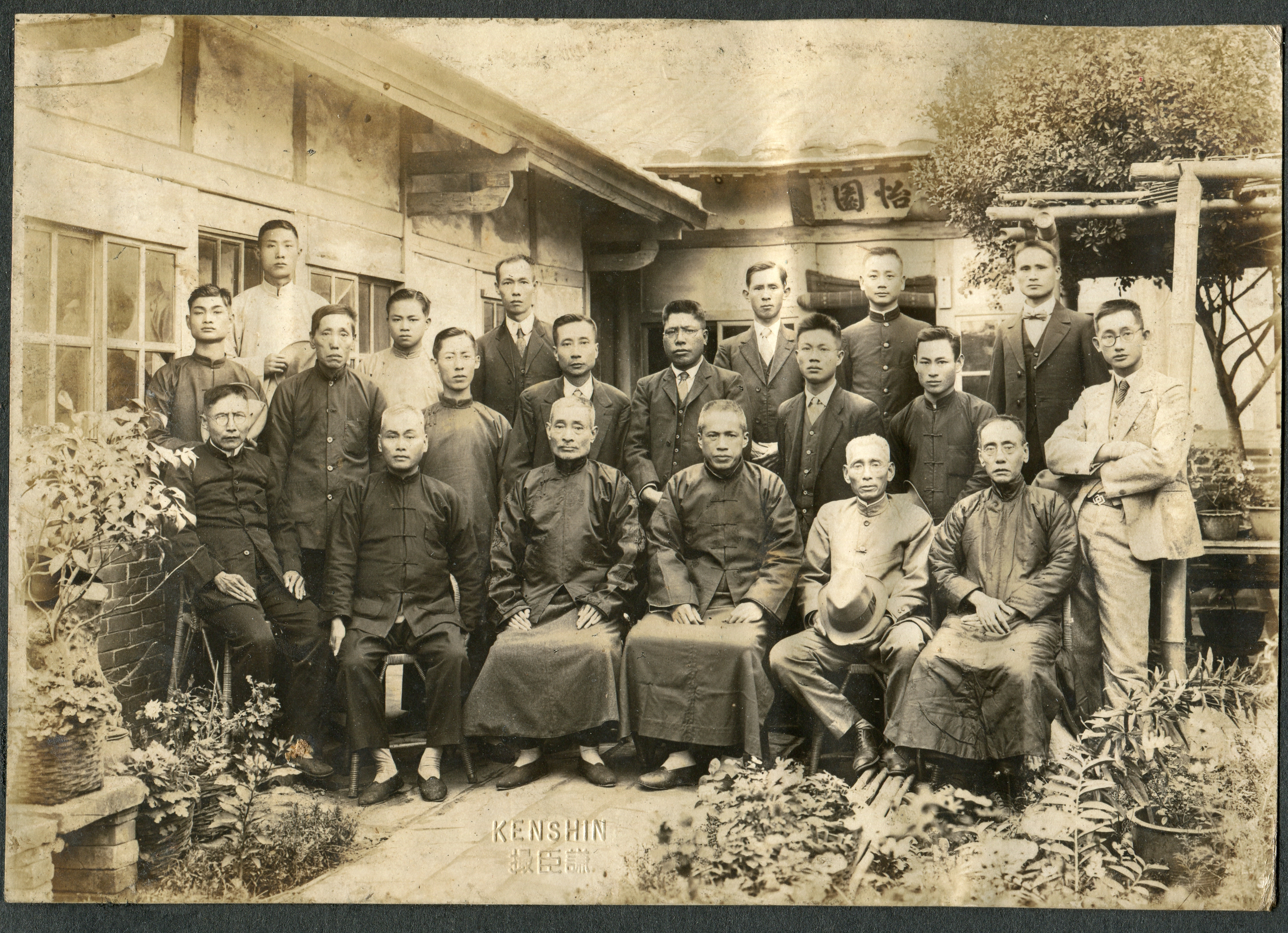 中文（台灣）: 鷇音吟社社員合影於社長林維朝宅之怡園